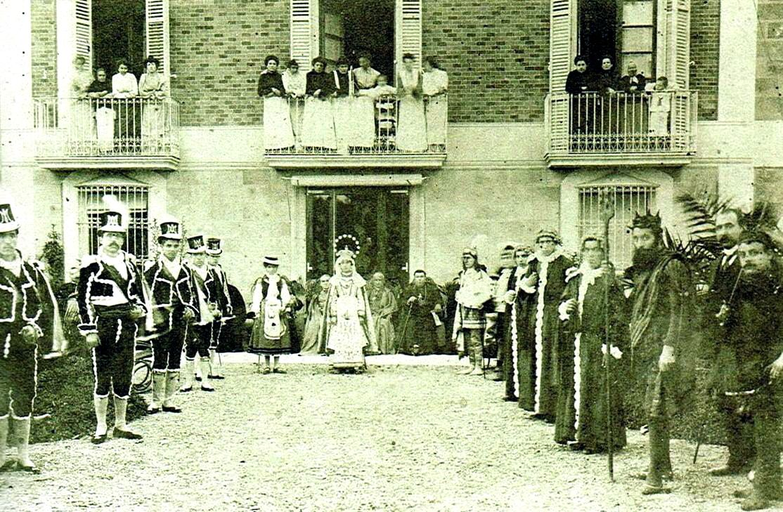 Ball de la Mare de Déu el 1904